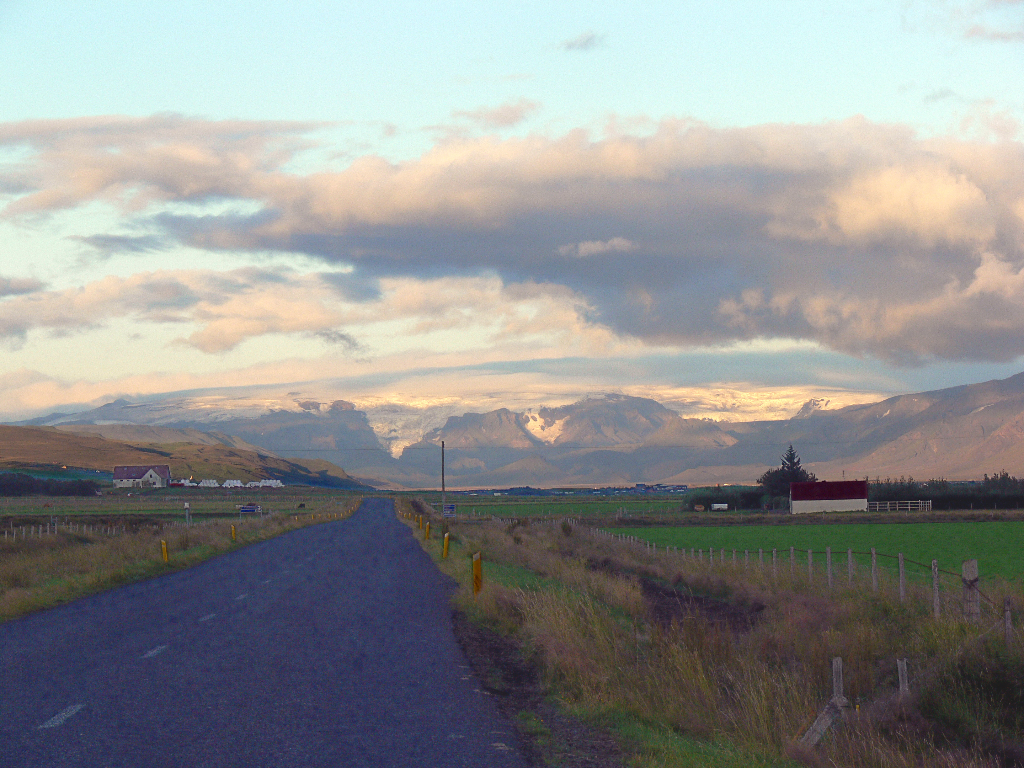 Fljótshlið mit Eyjafjallajökull in Südostisland.